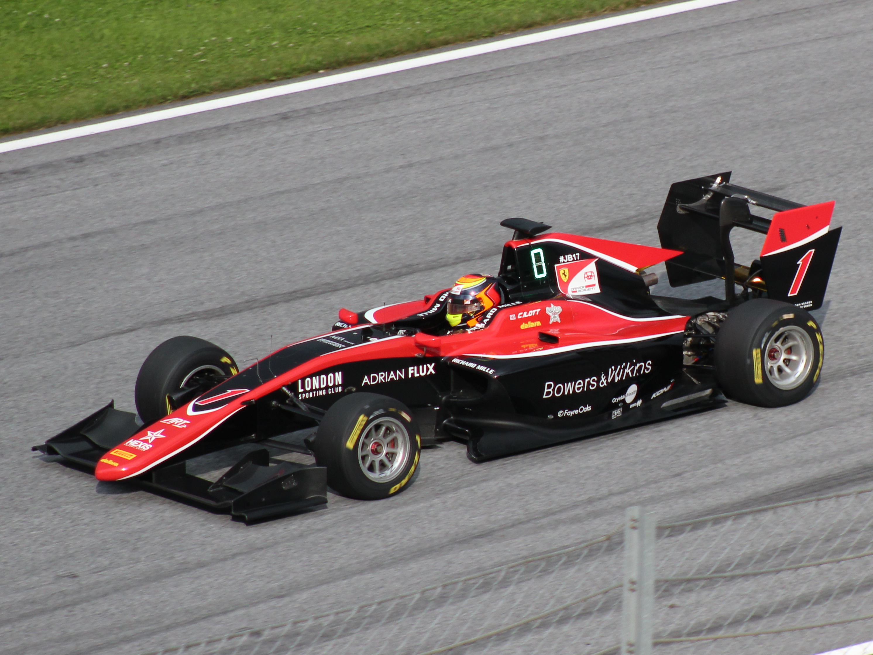 01 Callum Ilott beim Rennwochenende in Österreich 2018 (1)